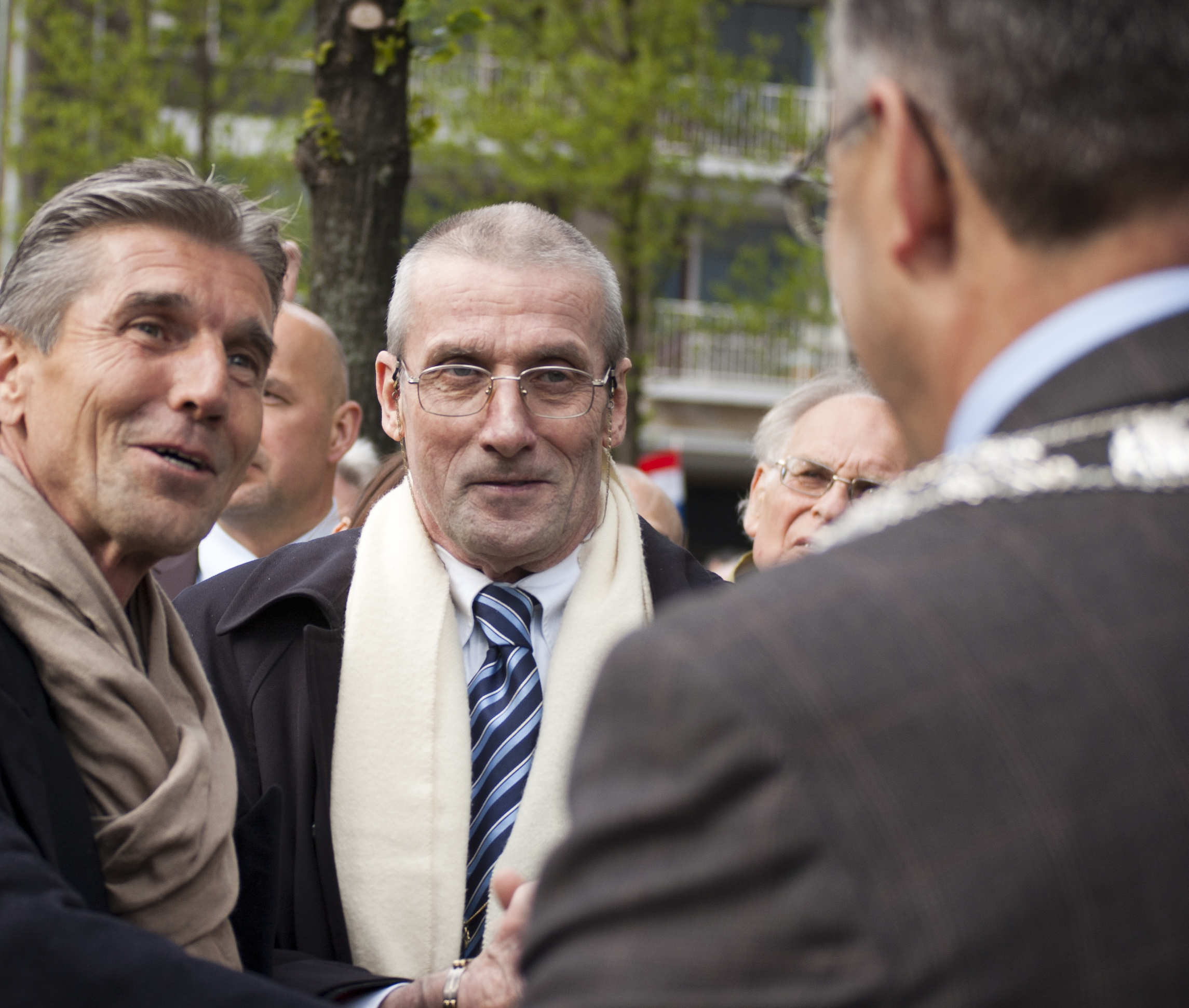 Simon (links) en Marten (midden) Fortuyn met burgemeester Ahmed Aboutaleb. Foto gemaakt tijdens de onthulling van de 'Pim Fortuynplaats'.